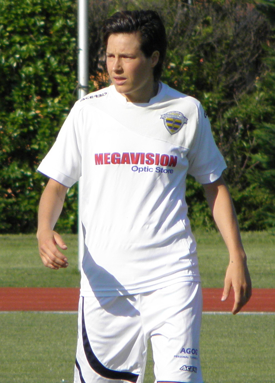 Abano Terme, Stadio delle Terme: 16 giugno 2018, spareggio UEFA Women's Champions League. Elisa Camporese durante una fase di gioco.